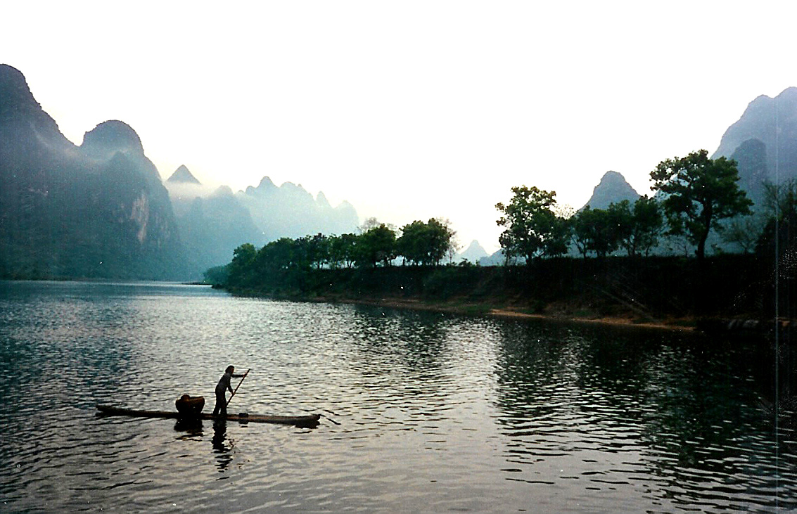 Guilin: Guilin a Li (Floss).